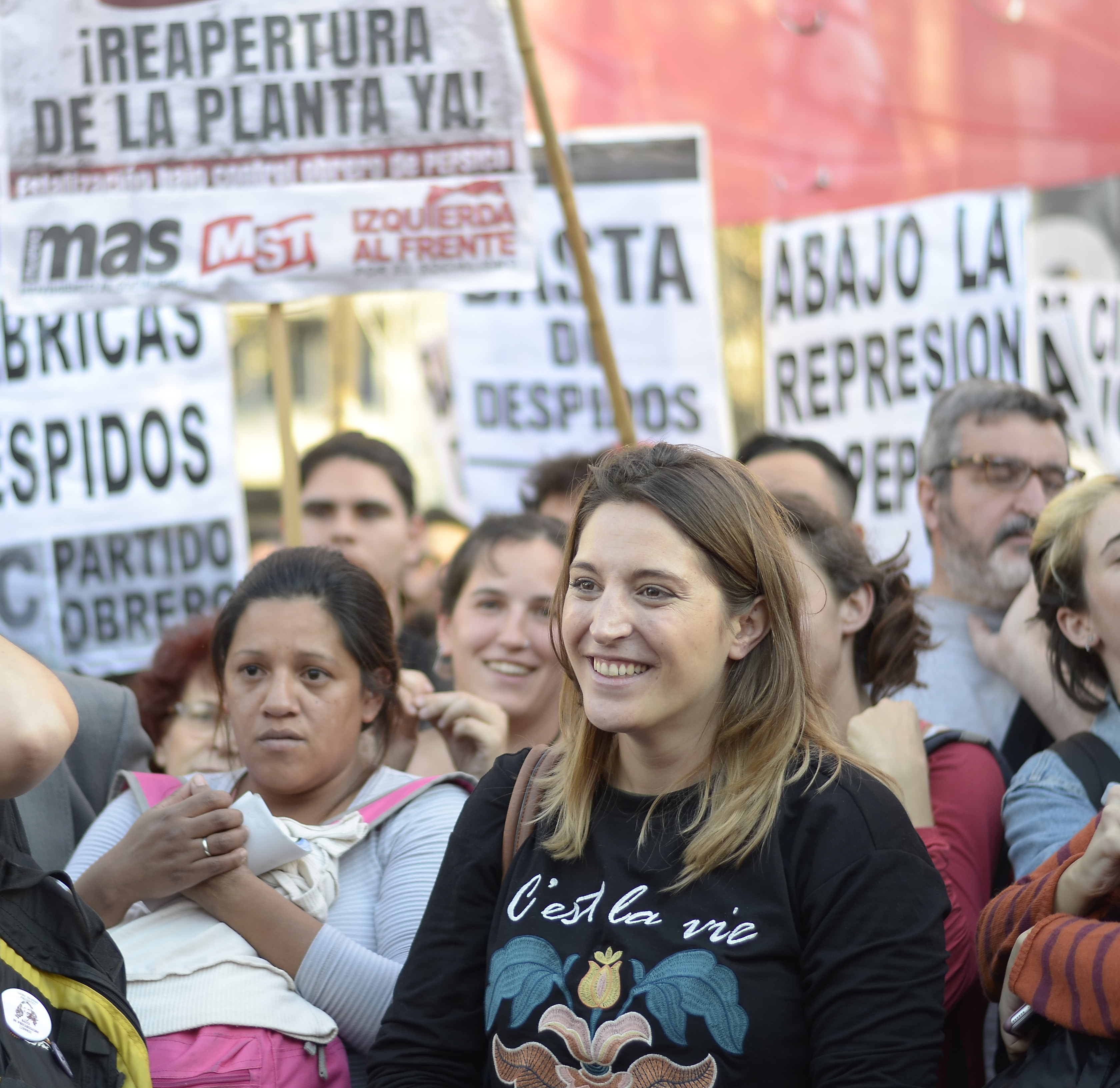 Manuela Castañeira, socialista y feminista, dirigente nacional del Nuevo Mas y Las Rojas